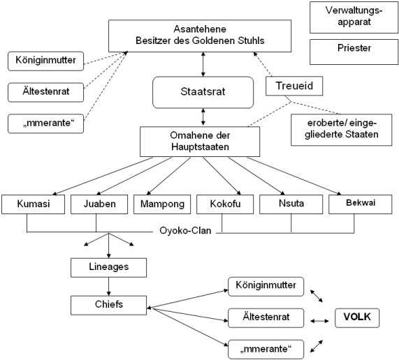 Organisationsstruktur. Hierarchien im Staatsapparat Asantes im 19. Jahrhundert.